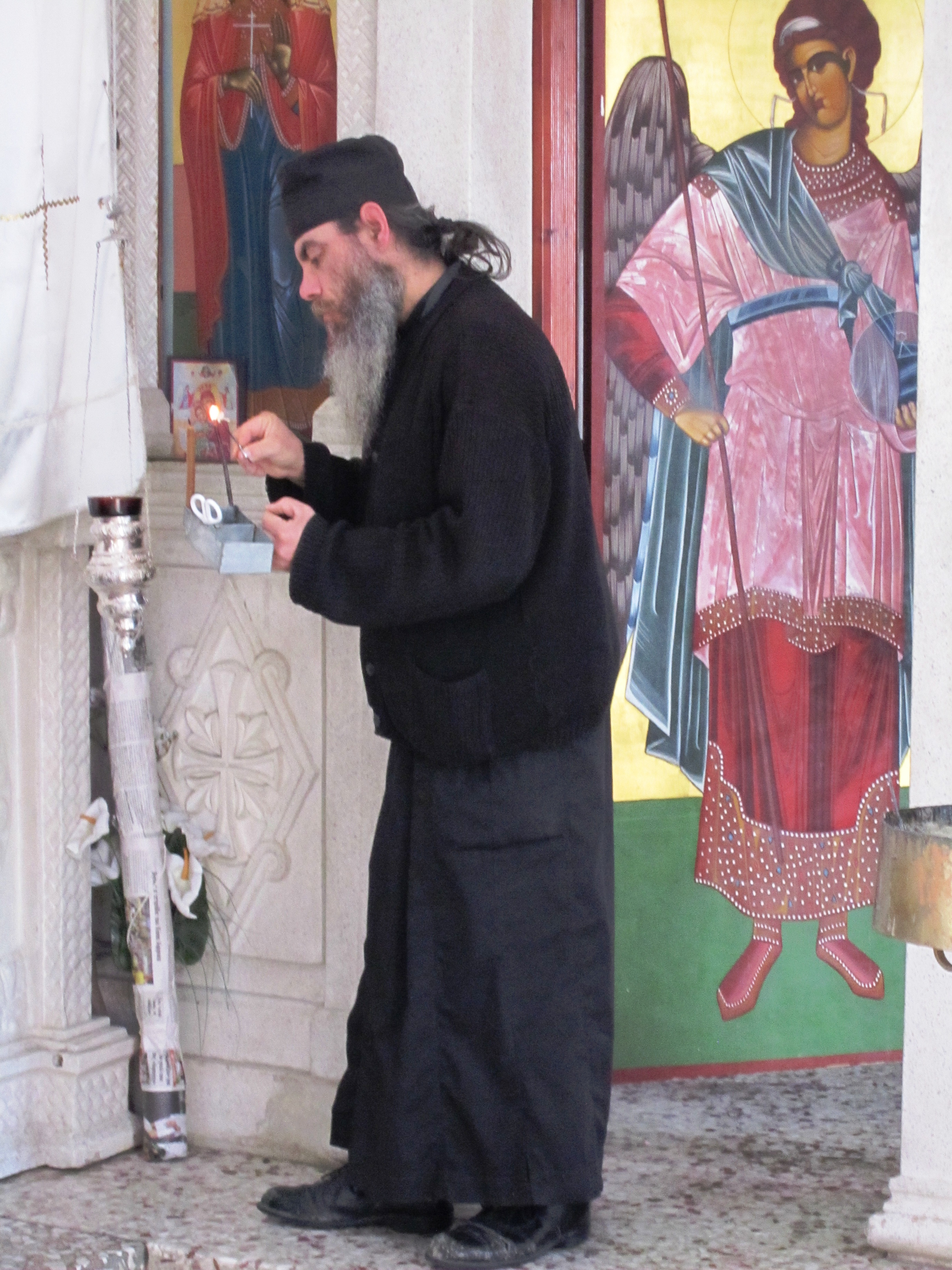 Cyprus - Panagidia Galaktotrofousa klooster